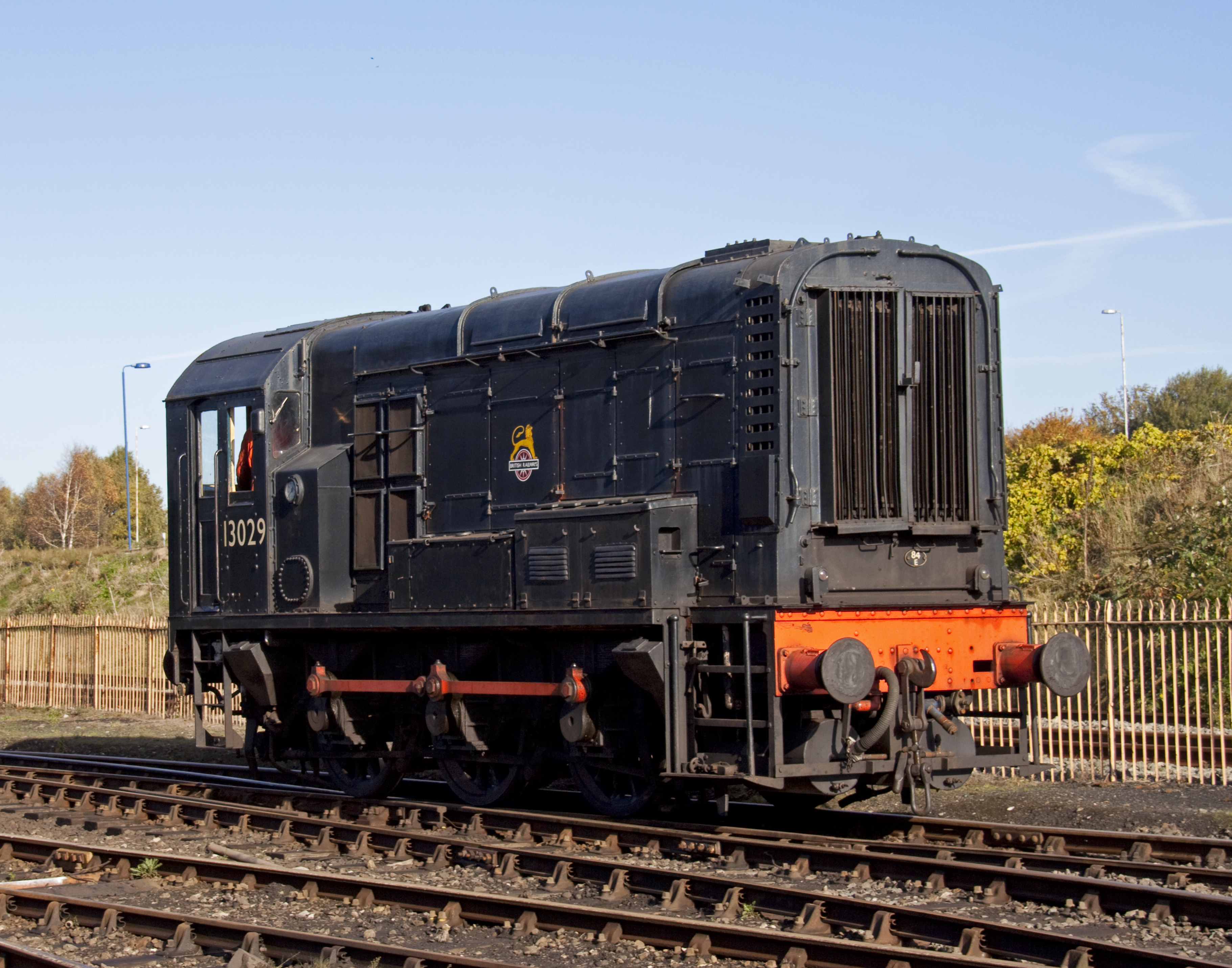 13029 shunter